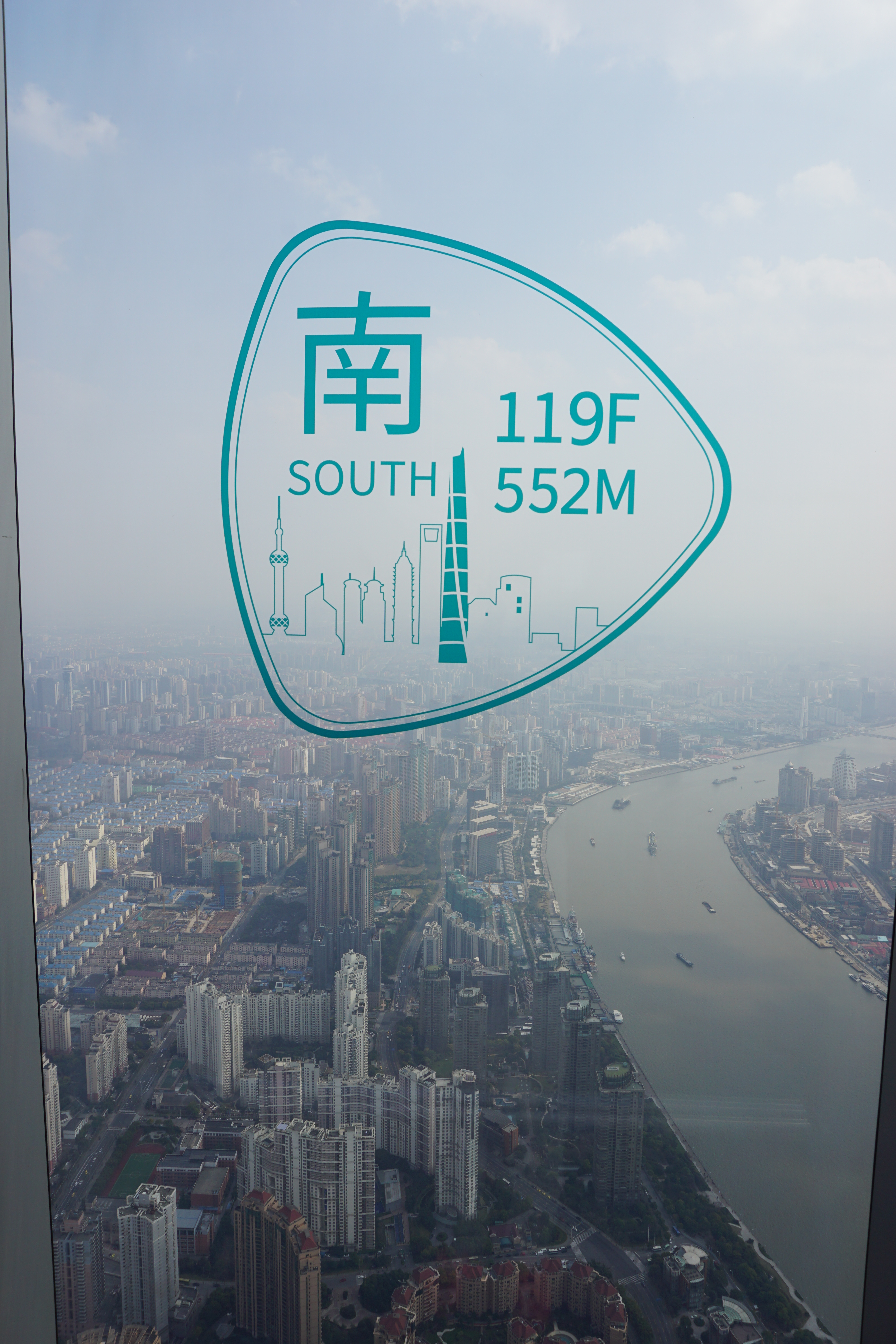 在上海中心大厦118层向南拍摄